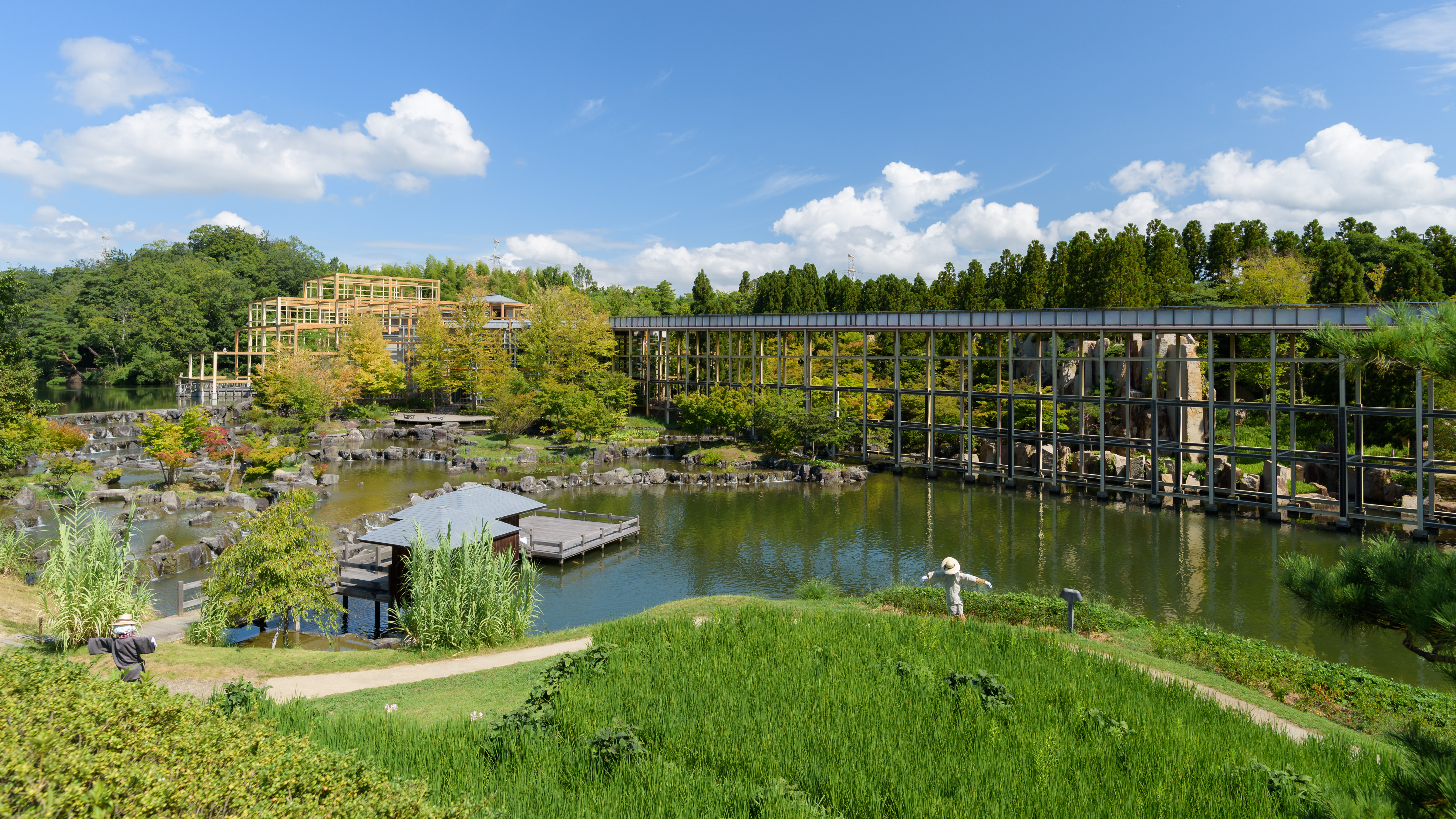 けいはんな記念公園水景園